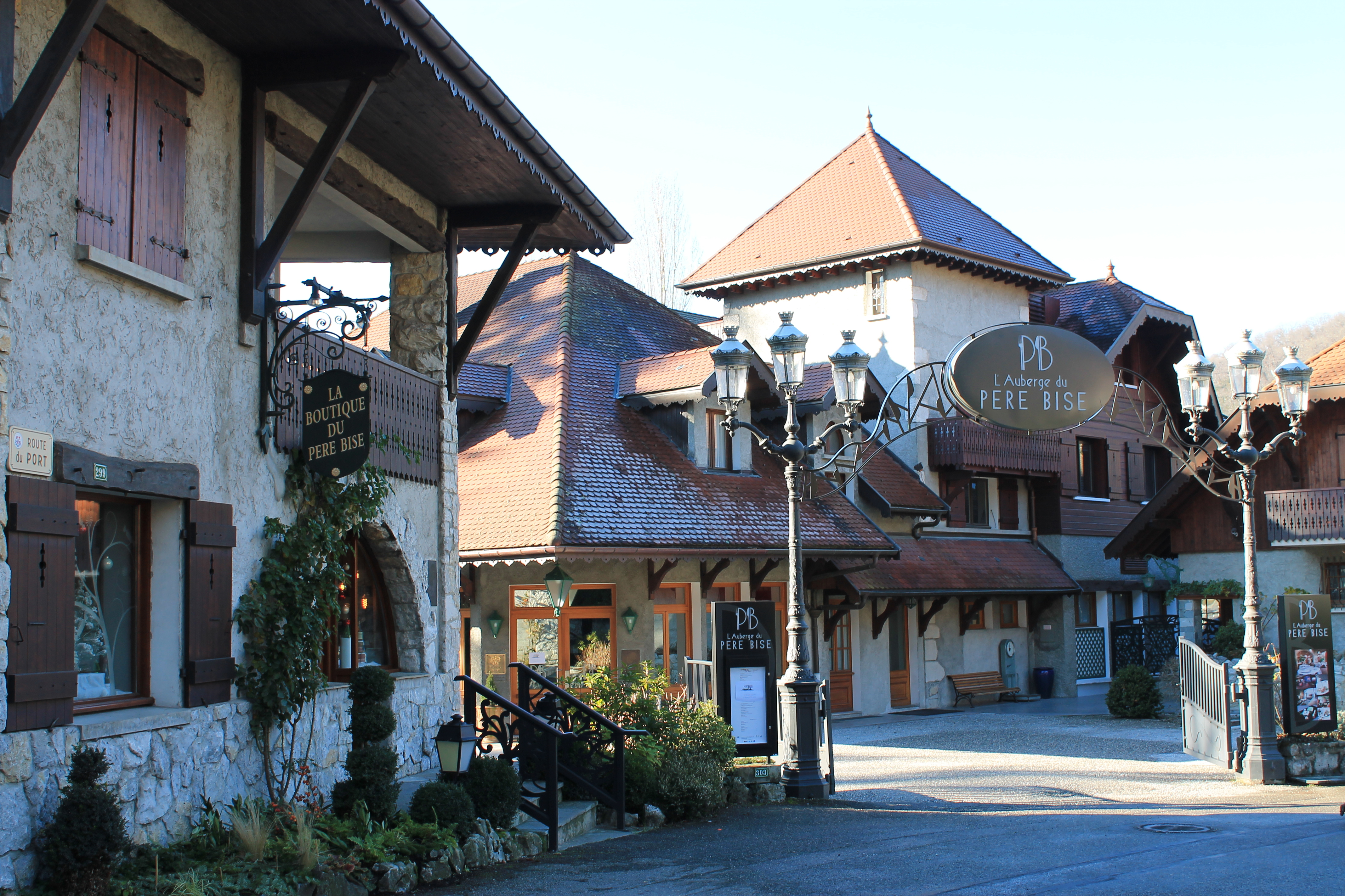 Auberge du Pere Bise à Talloires